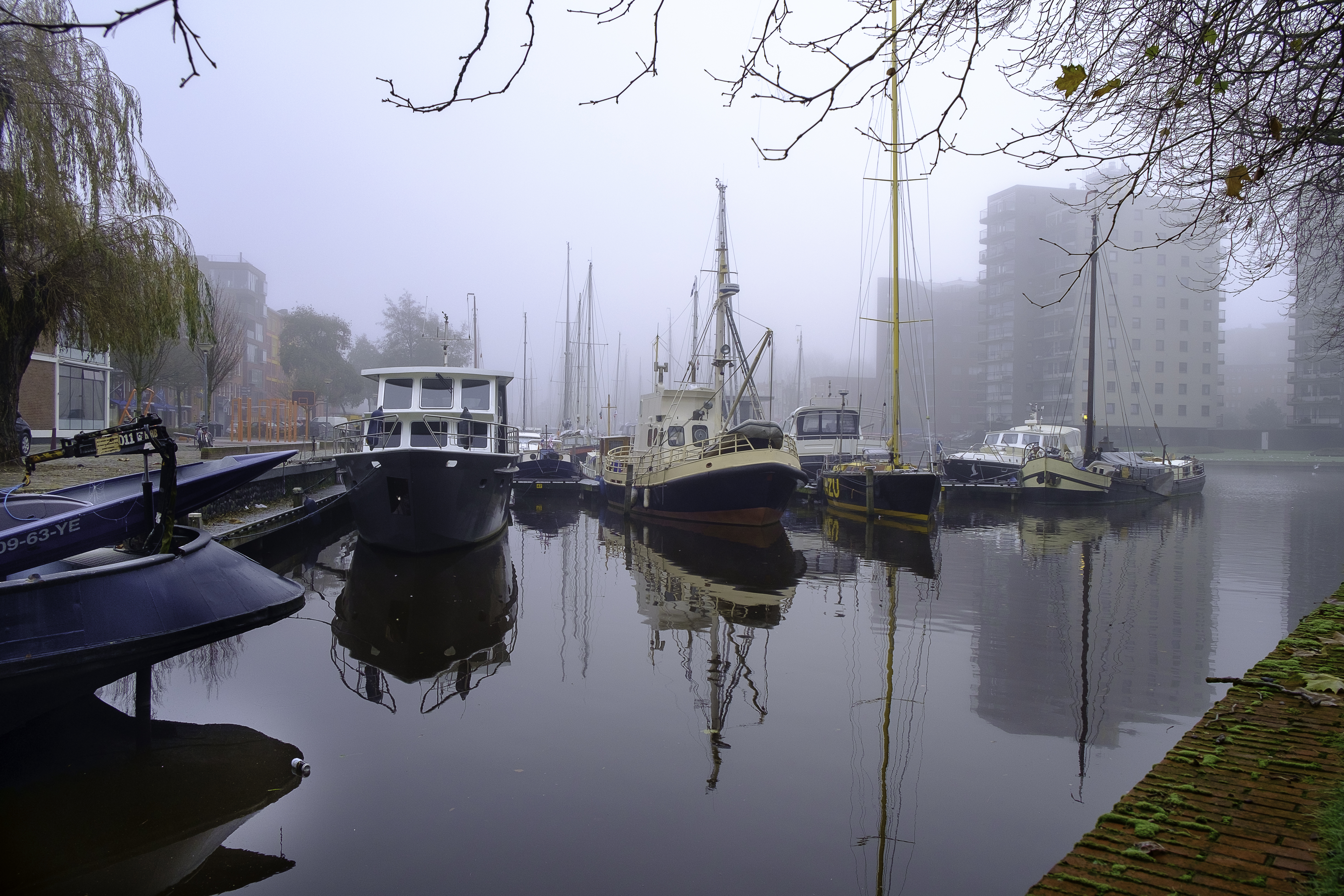 De Oosterhaven op een mistige morgen